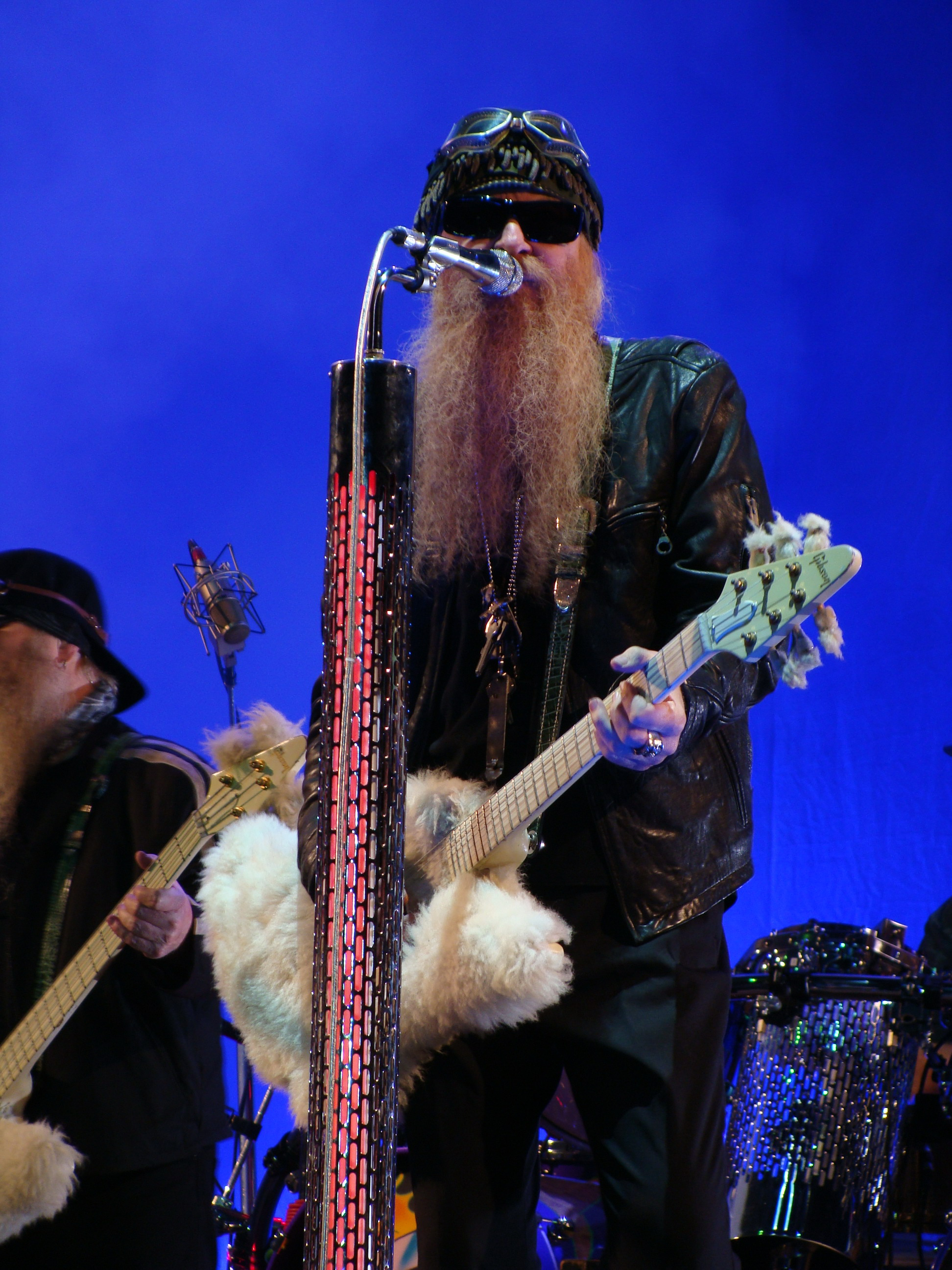 Billy Gibbons, en un concierto de ZZ Top en el Bilbao BBK festival 2008.